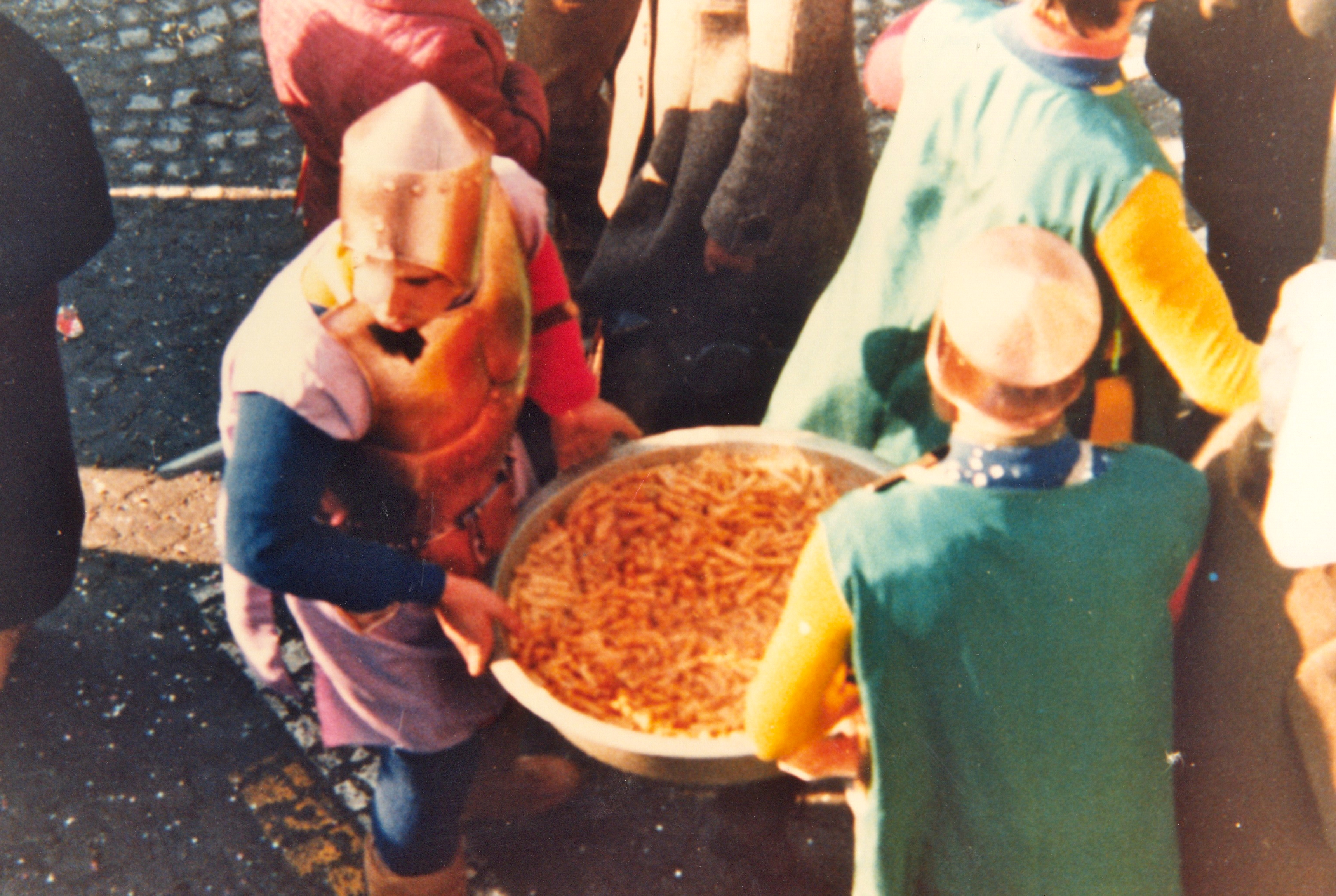 Finito il processo al Biagio, in piazza Crosara di Castello Tesino si serve la tradizionale pasta del Biasgio